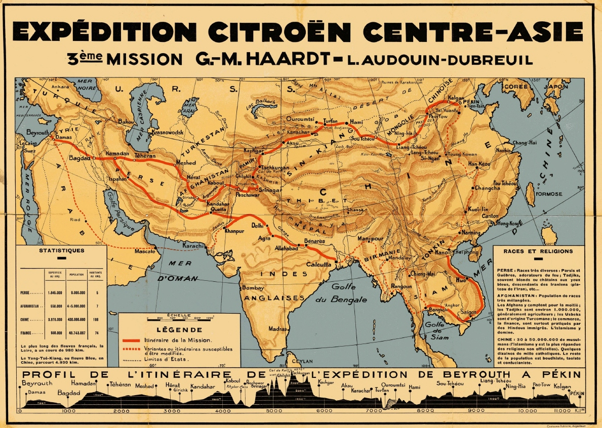 Croisière Jaune. Carte publiée en 1931, au début de l'expédition par les services Citroën avec les différents itinéraires prévus et/ou possibles (non entièrement réalisés en 1932, à la fin du voyage).